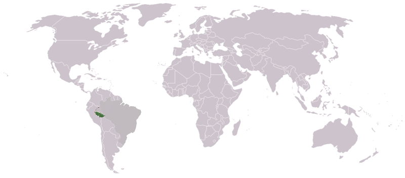 mapa de la catual provicia de Acre en brasil